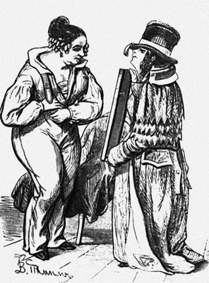 Сенсации и замечания госпожи Курдюковой. Книжная иллюстрация.